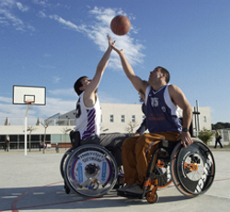 club esportiu guttmann